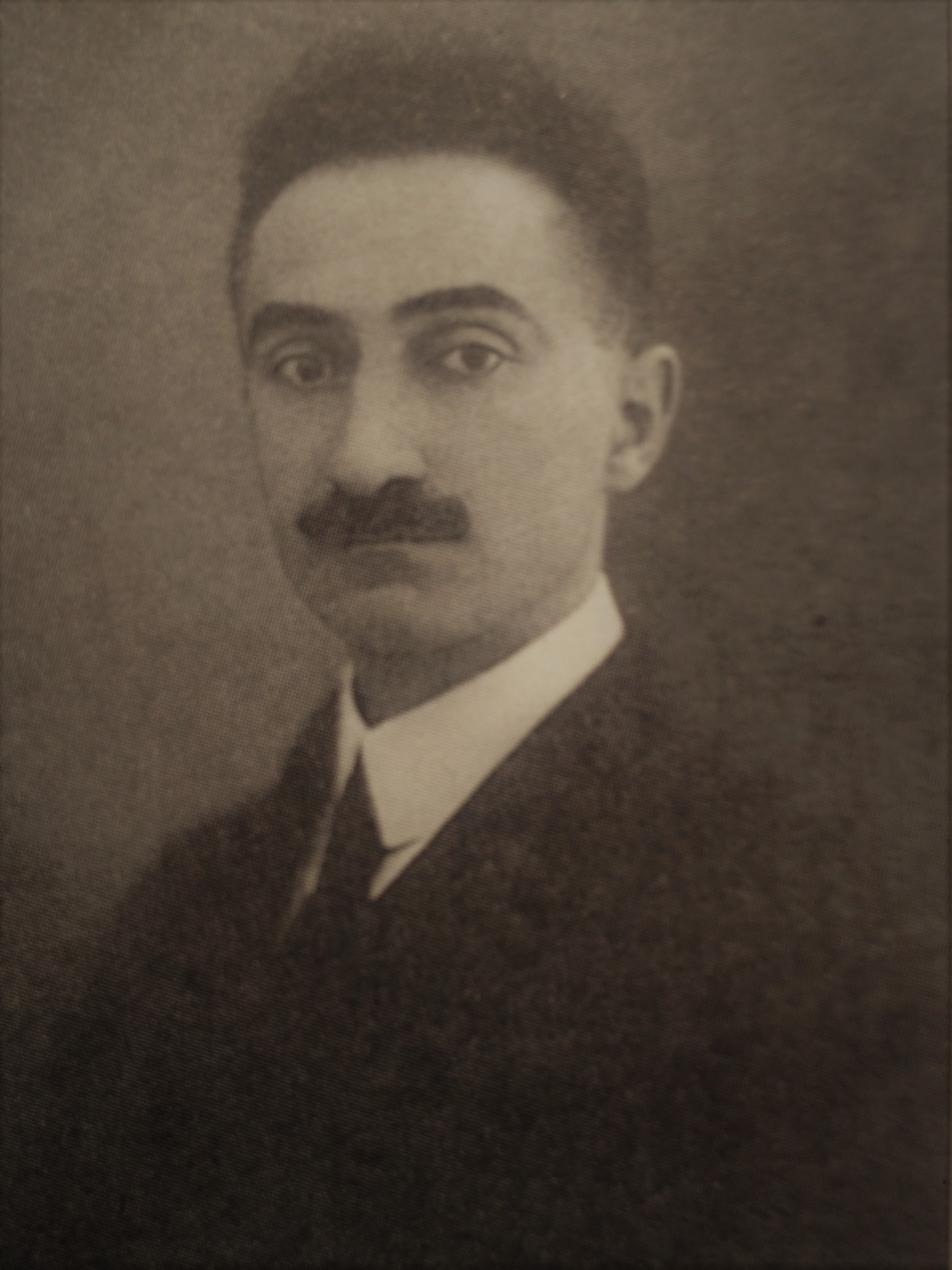 Donato Donati